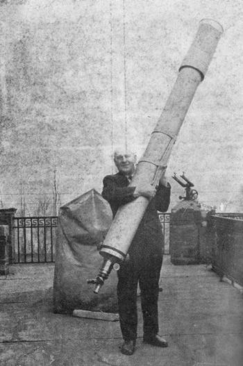 Kazimierz Kordylewski - zdjęcie wykonano na tarasie Obserwatorium Astronomicznego Uniwersytetu Jagiellońskiego w Krakowie (kwiecień 1964)